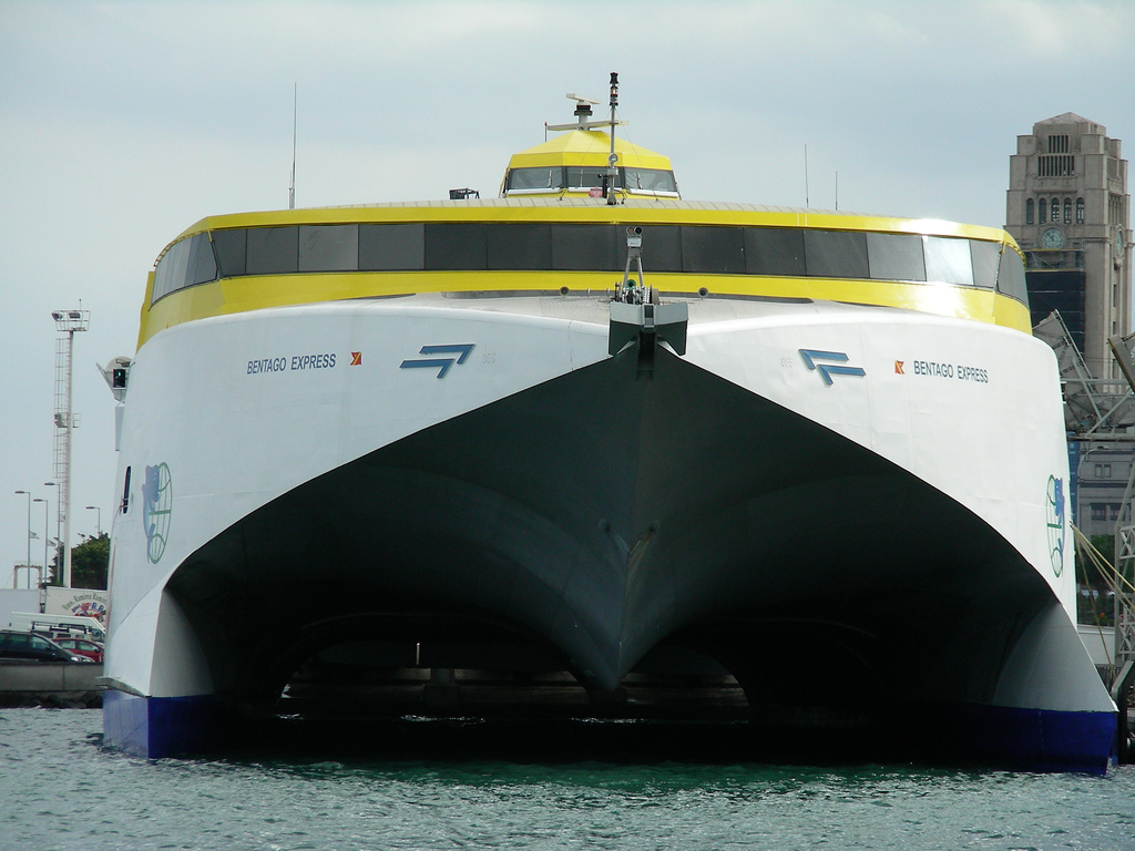 Ferry de la compañía Fred Olsen Express en el Puerto de Santa Cruz de Tenerife, Canarias Type: Fast Ferry Wavepiercing Catamaran IMO Number: 9213337 MMSI Number: 224689000 Callsign: EHYG Length: 96 m Beam: 26 m